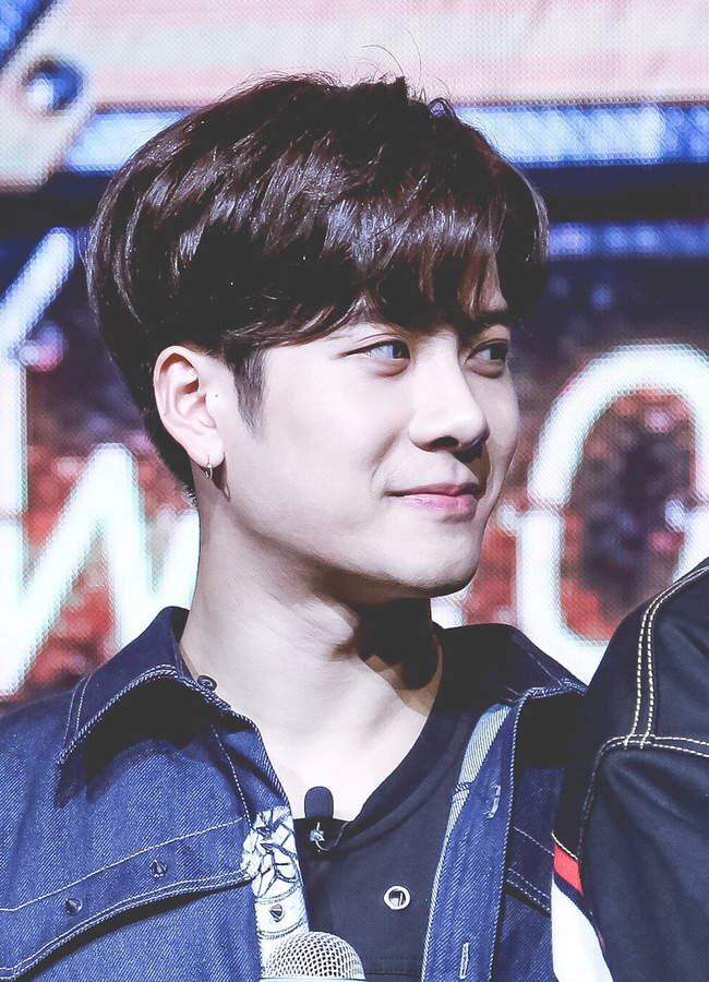 明星大侦探第三季发布会 王嘉尔 高清